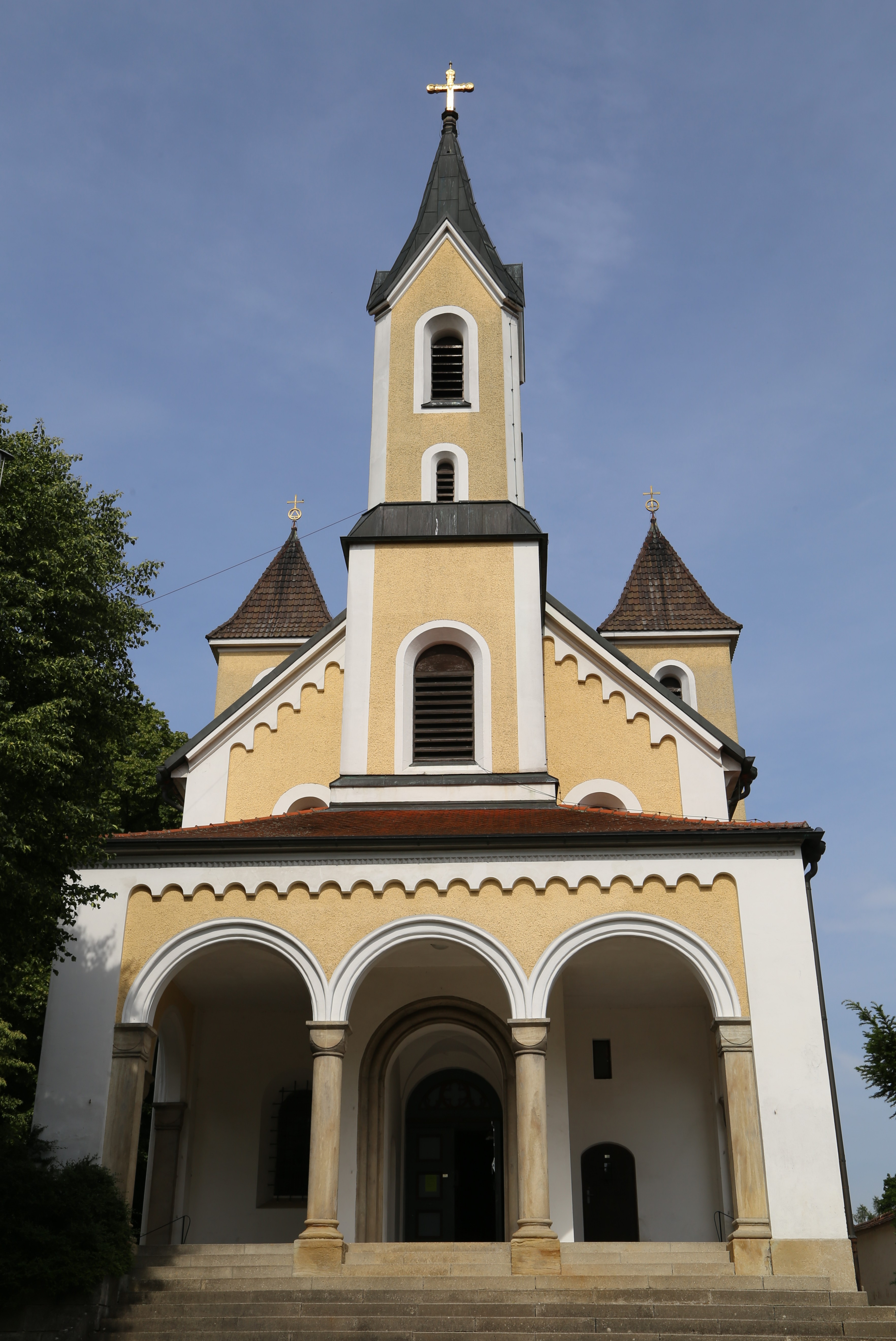 Am Dreifaltigkeitsberg 8; Katholische Pfarrkirche Hl. Dreifaltigkeit, Saalbau mit eingezogenem Chor, Chorflankentürmen und Vorhalle mit offenen Arkaden und Mittelturm, 1713-15, Fassade, Vorhalle und Turm im Rundbogenstil, 1837 wohl nach Plänen von Leo von Klenze, Erweiterung nach Westen 1933 durch Heinrich Hauberrisser; mit Ausstattung